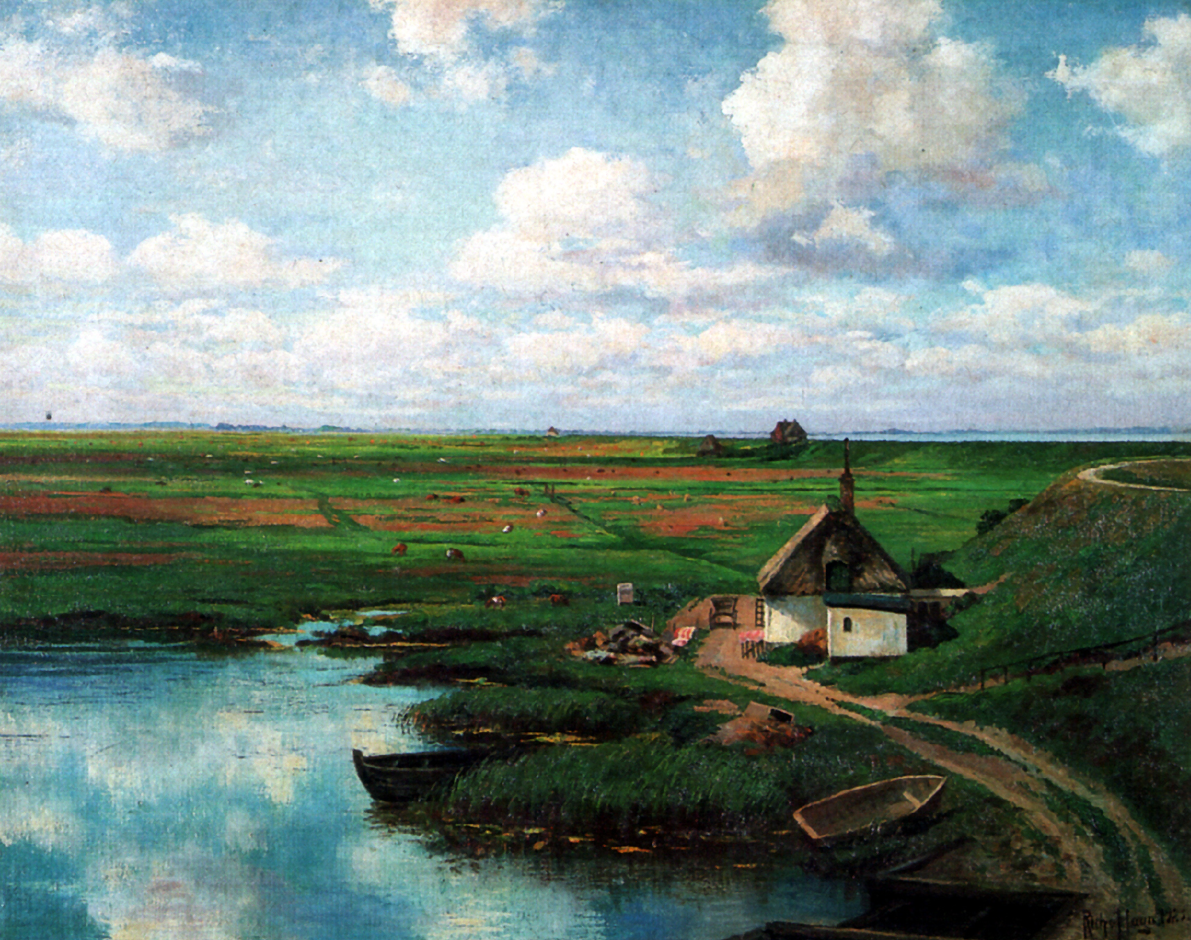 Halbmondwehle Südermarsch (Kreis Nordfriesland), Ölgemälde von Richard von Hagn (1850-1933), Nissenhaus Husum, 1923